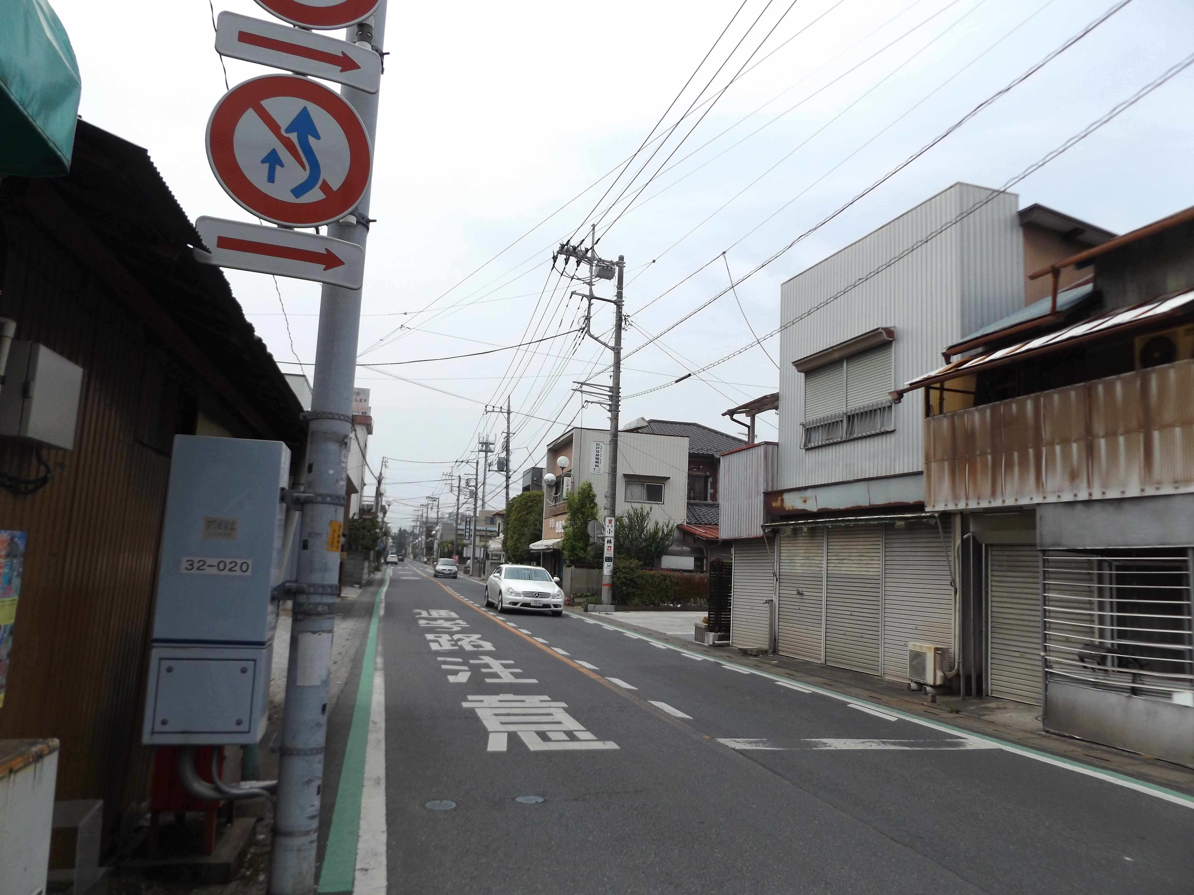 埼玉県道372号下高野杉戸線の終点付近（埼玉県南北葛飾郡杉戸町、東武動物公園駅前交差点手前）。